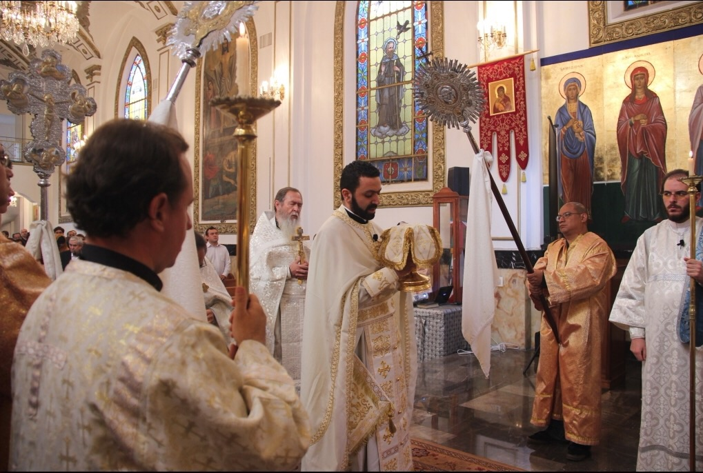 Catedral Ortodoxa San Jorge Archimandrite Fadi RABBAT - Chancellor Archbishop Antonio CHEDRAOUI Assistant Protodiacon Maxin Talalai Tuxpan 30 Colonia Roma Sur Tel. (55) 55 84 63 73 Iglesia Católica Apóstolica Ortodoxa de Antioquía Arquidiócesis de México,Venezuela,Centroamerica y el Caribe Ciudad de México Visita la Pagina Facebook y da clik en me gusta © Álbum 3180 By Catedrales e Iglesias By Cathedrals and Churches By Catedrais e Igrejas Par Cathédrales et Eglises Iglesia Católica Apóstolica Ortodoxa de Antioquía